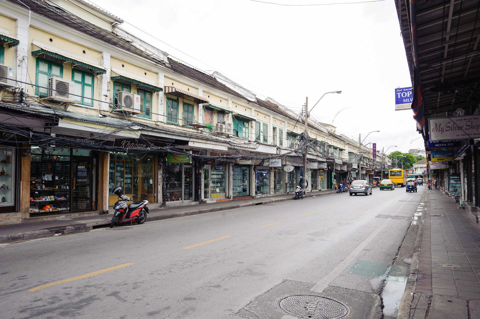 ตึกแถวริมถนนตะนาว (ช่วงที่ 1)